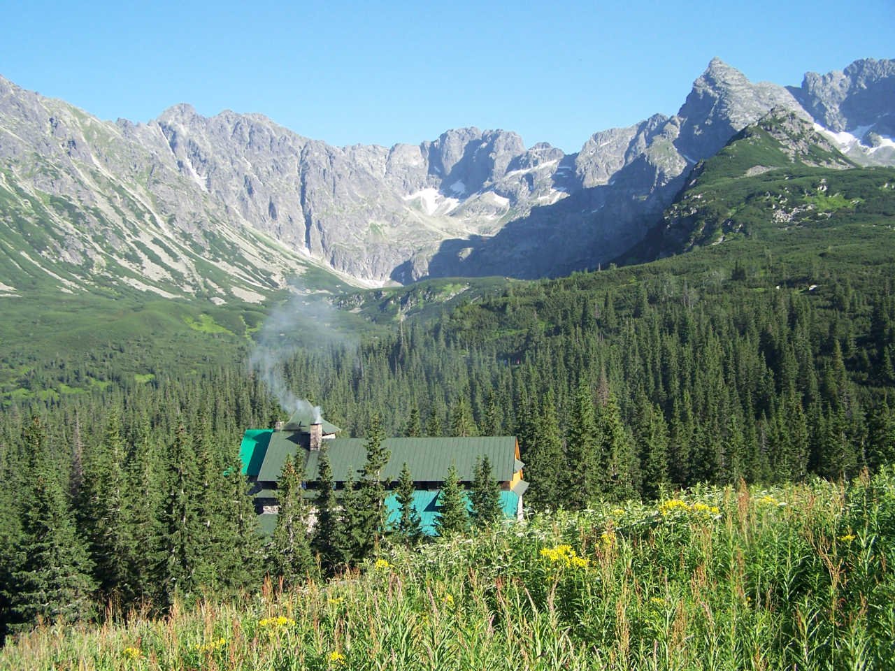 Dolina Gąsienicowa (Tatra Mountains)